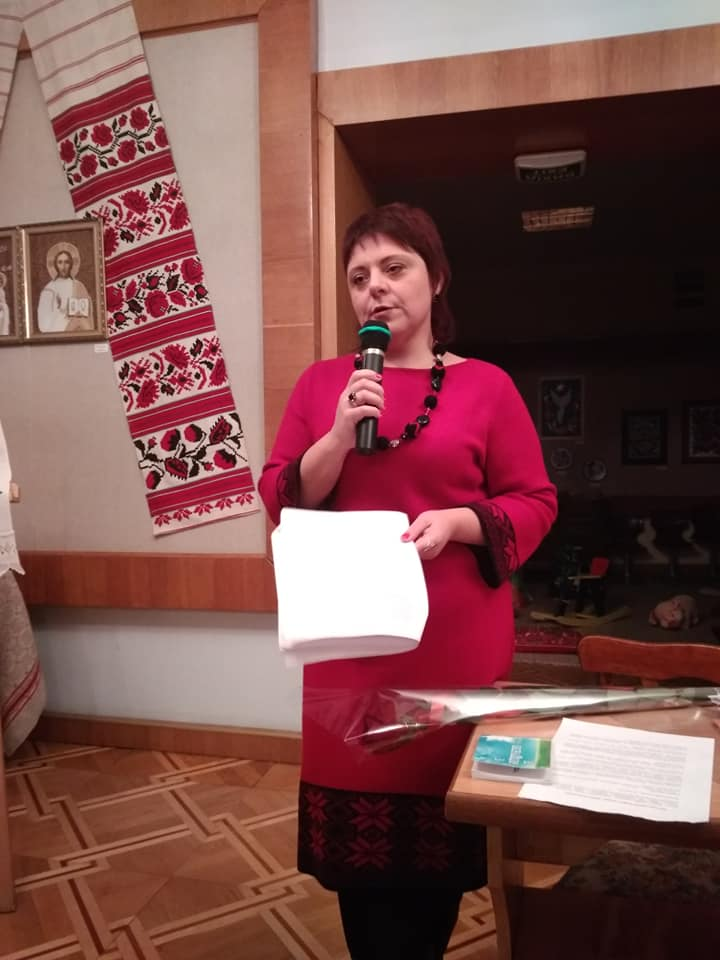 Тетяна Шептицька